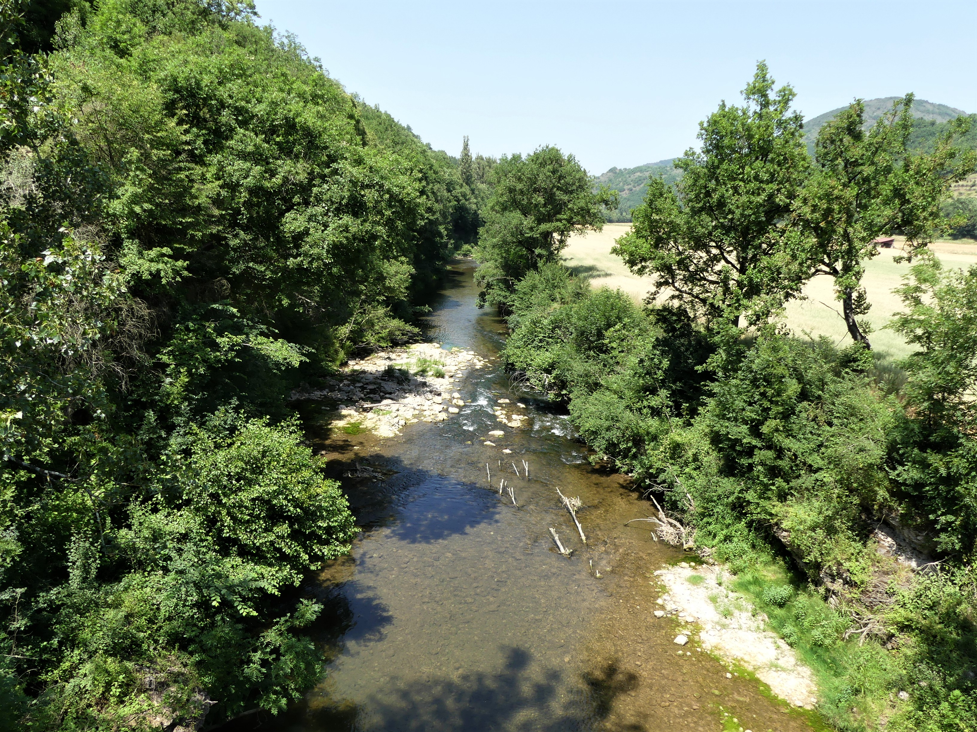 La Sorgues au niveau du pont Vieux de Lapeyre, Versols-et-Lapeyre, Aveyron, France. Vue prise en direction de l'aval.